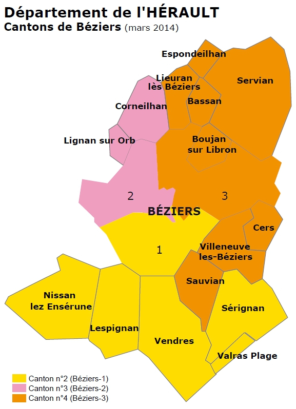 Cantons suite au redécoupage cantonal